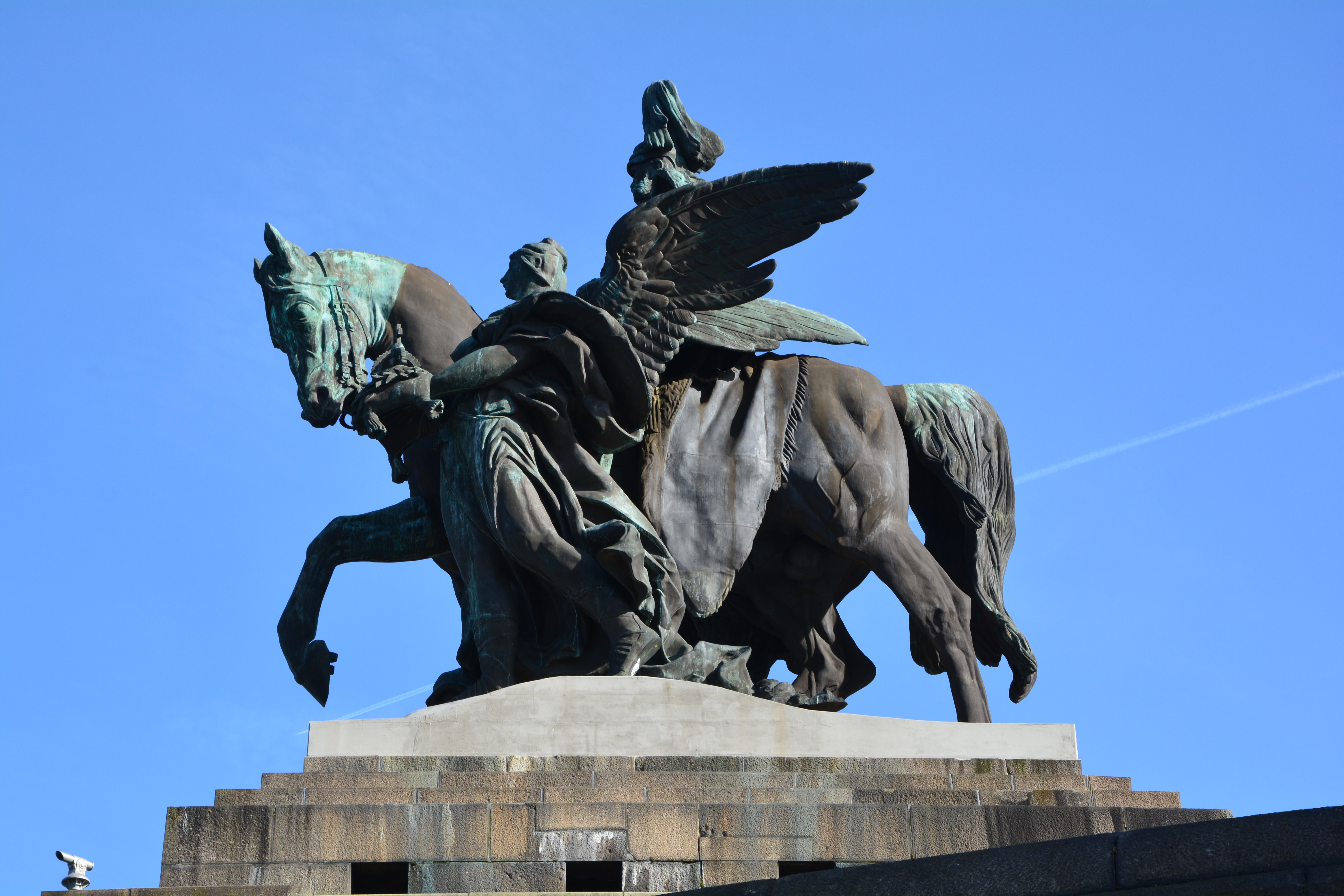 Koblenz, Denkmal Kaiser Wilhelm am Deutschen Eck.